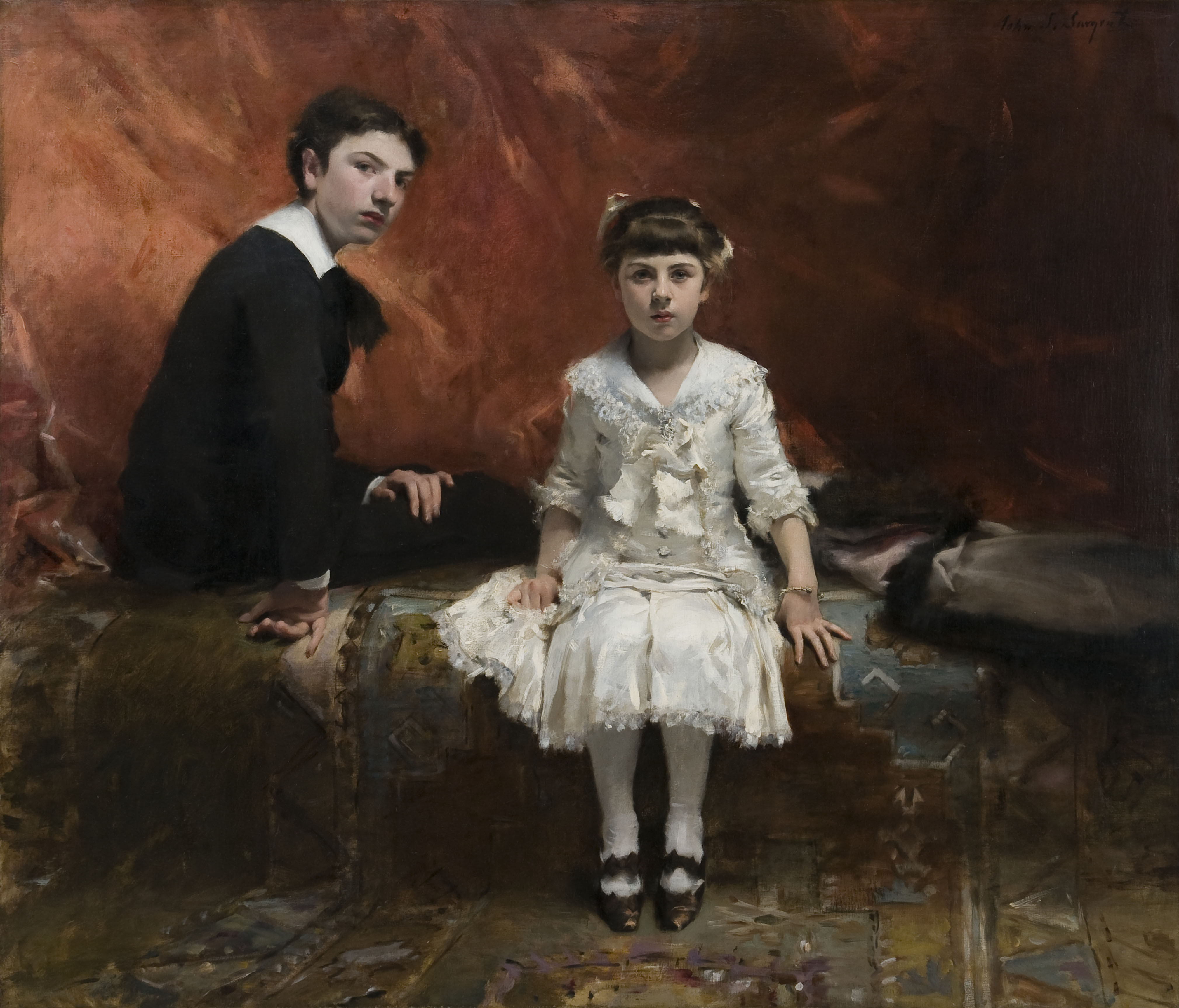 Édouard Pailleron's children.